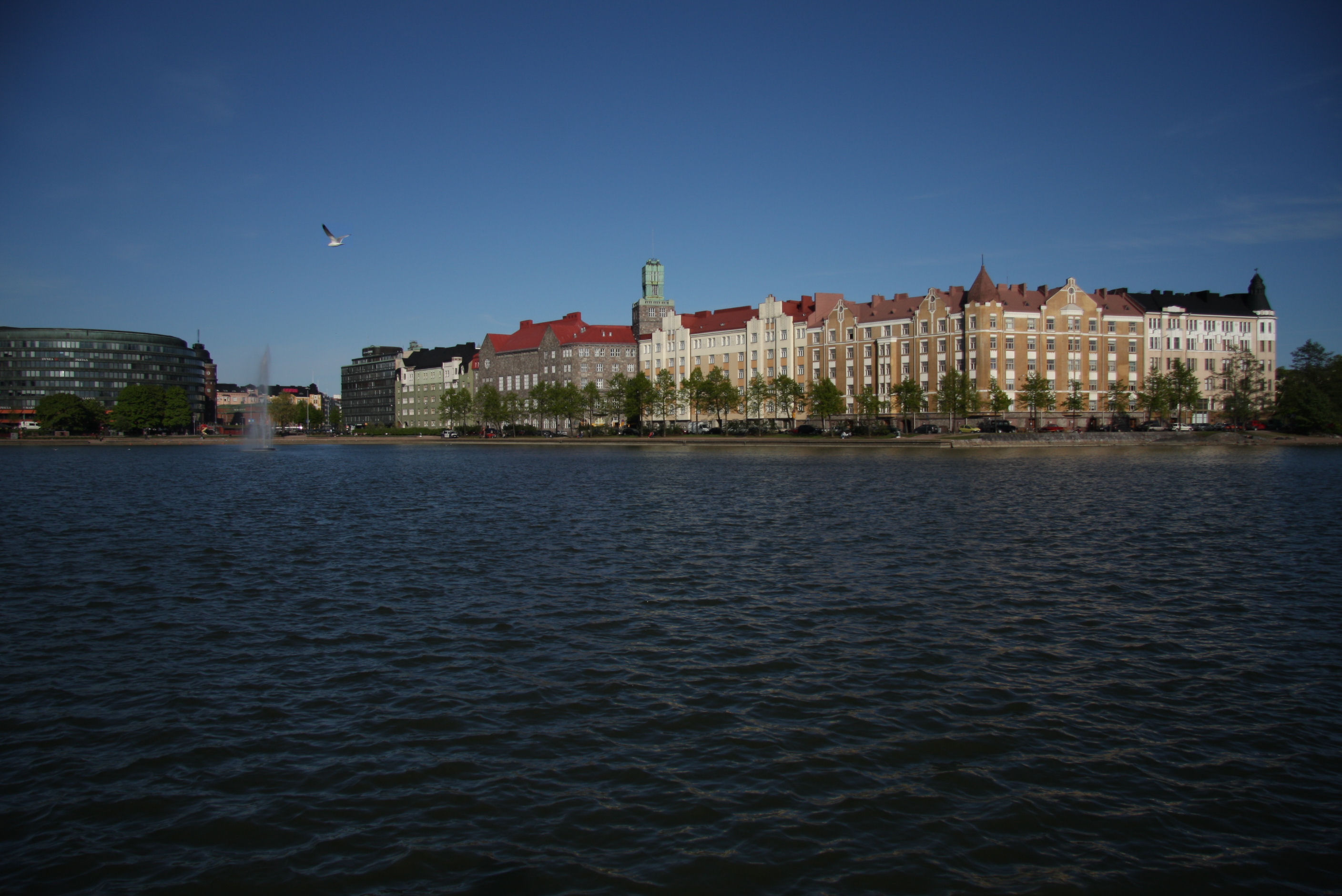 Eläintarhanlahti and Säästöpankinranta seen from Tokoinranta